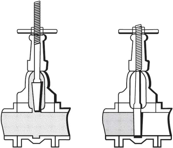 احد انواع الصممات ويدعى صمام البوابة